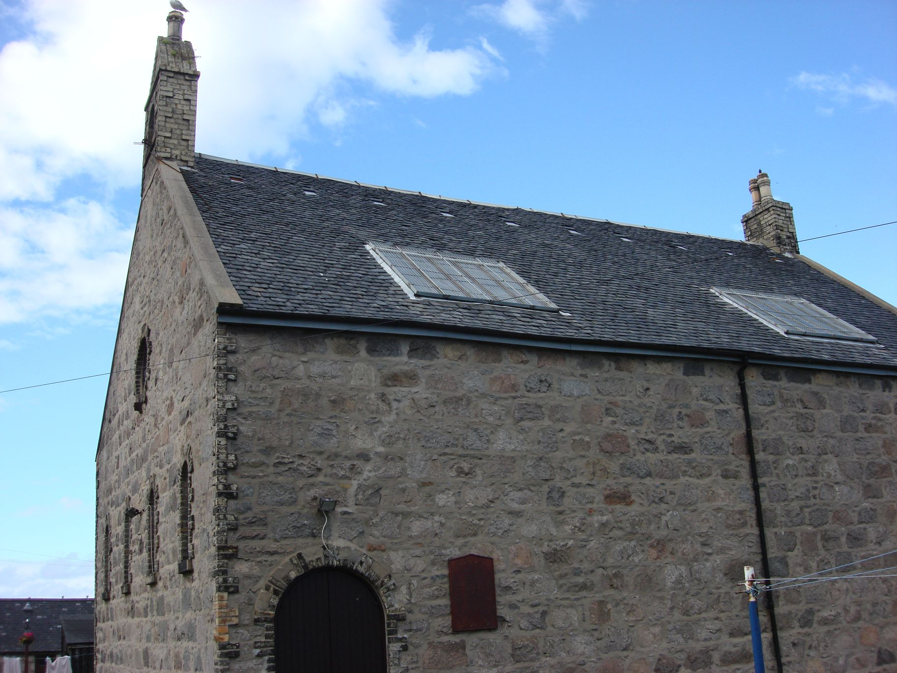 La Chiesa di Footdee, Church of Footdee, Aberdeen, Scotland